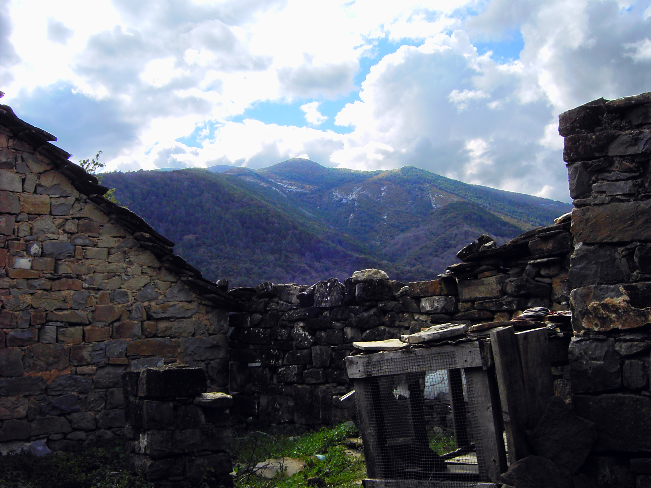 Tozal de Cruzeta Yeba (1719m) visto desde una casa derruida en Moriello de Sampietro, perteneciente al municipio de Boltaña, en Sobrarbe (Huesca)